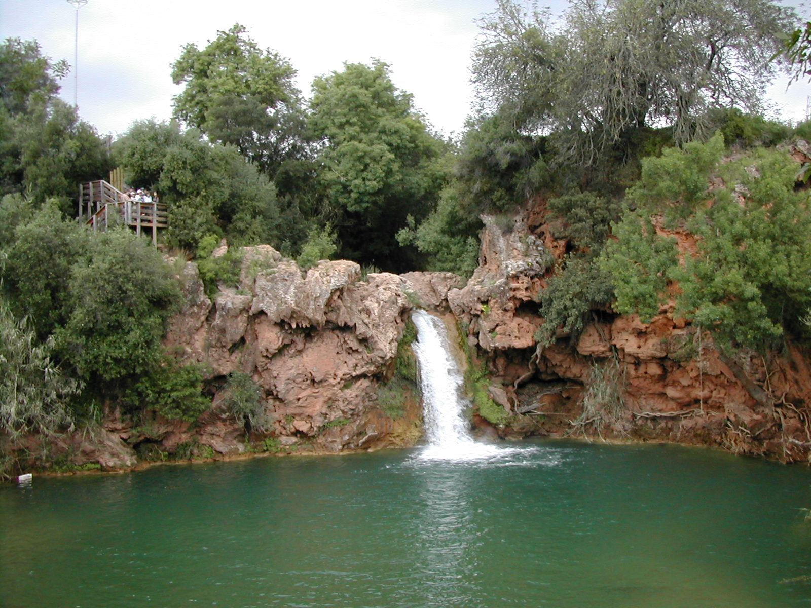 Pego do Inferno, Santo Estêvão, Tavira, Portugal